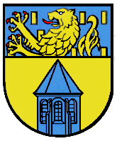 Das ehemalige Wappen von Amt Keppel von 1937